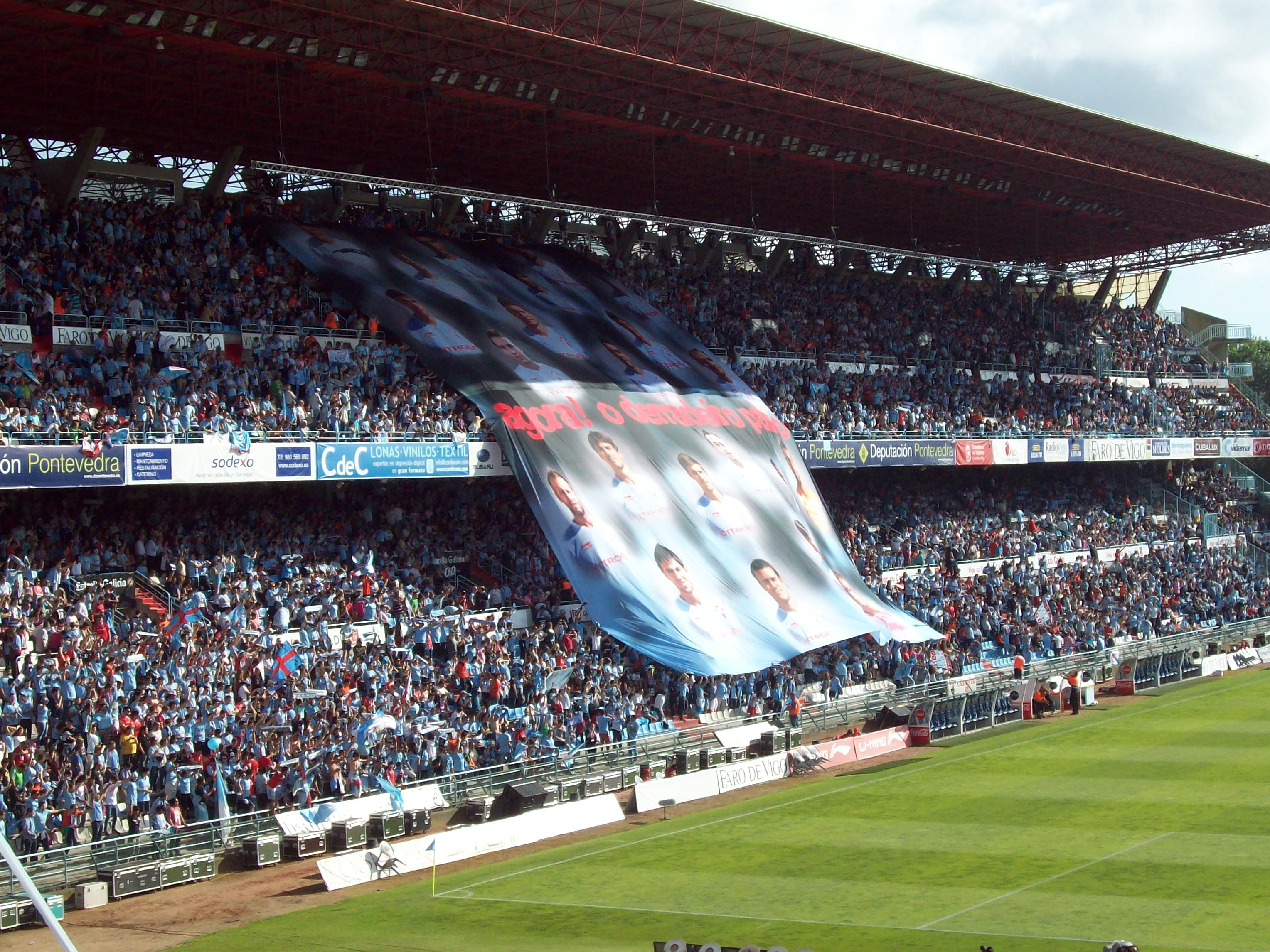 Pancarta co lema "Agora! O derradeiro paso", despregada no Estadio de Balaídos no partido entre o Celta de Vigo e o Córdoba CF, que significou o ascenso dos vigueses a primeira división.